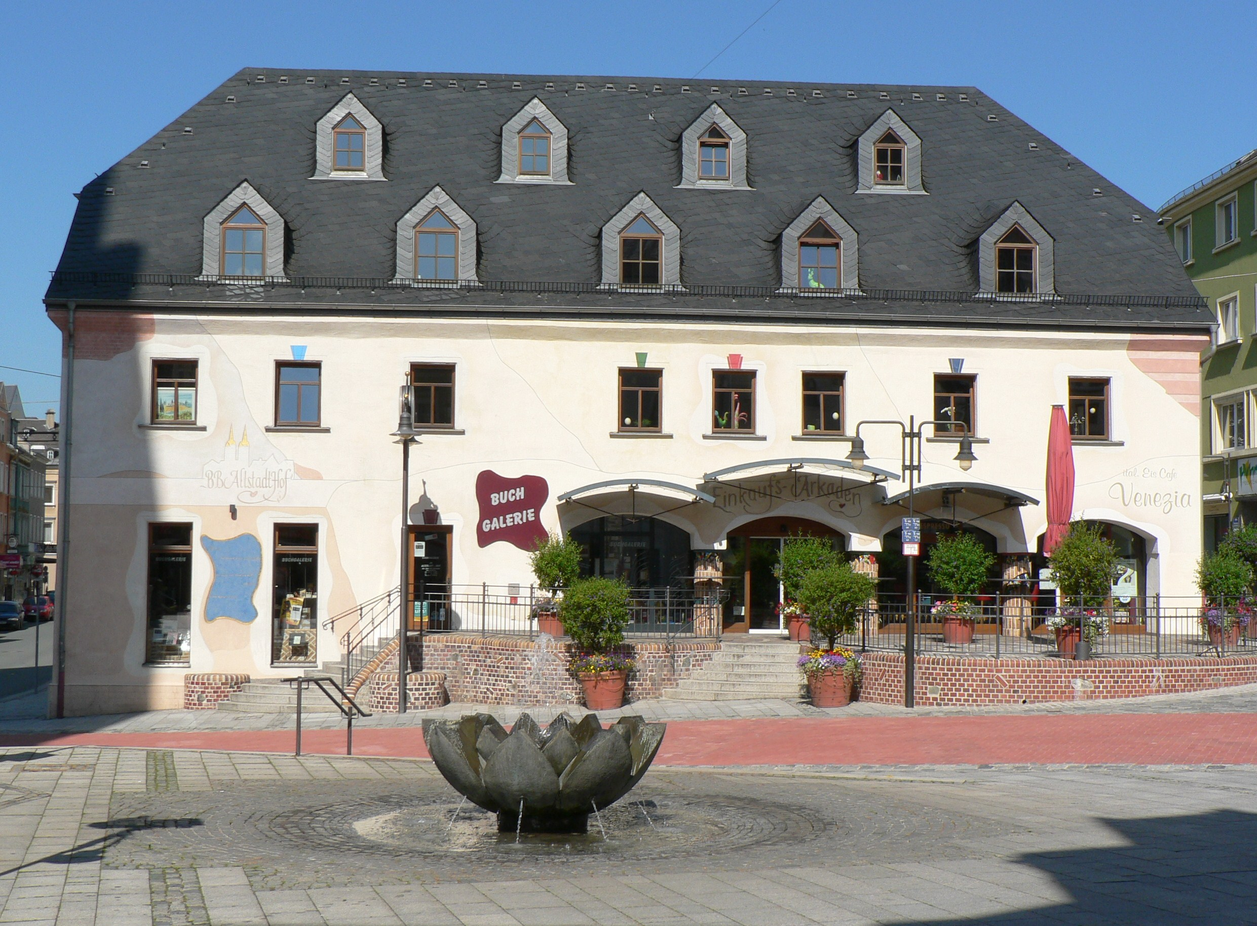 Der Altstadthof im Zentrum der Altstadt gegenüber der Stadtpfarrkirche St. Marien